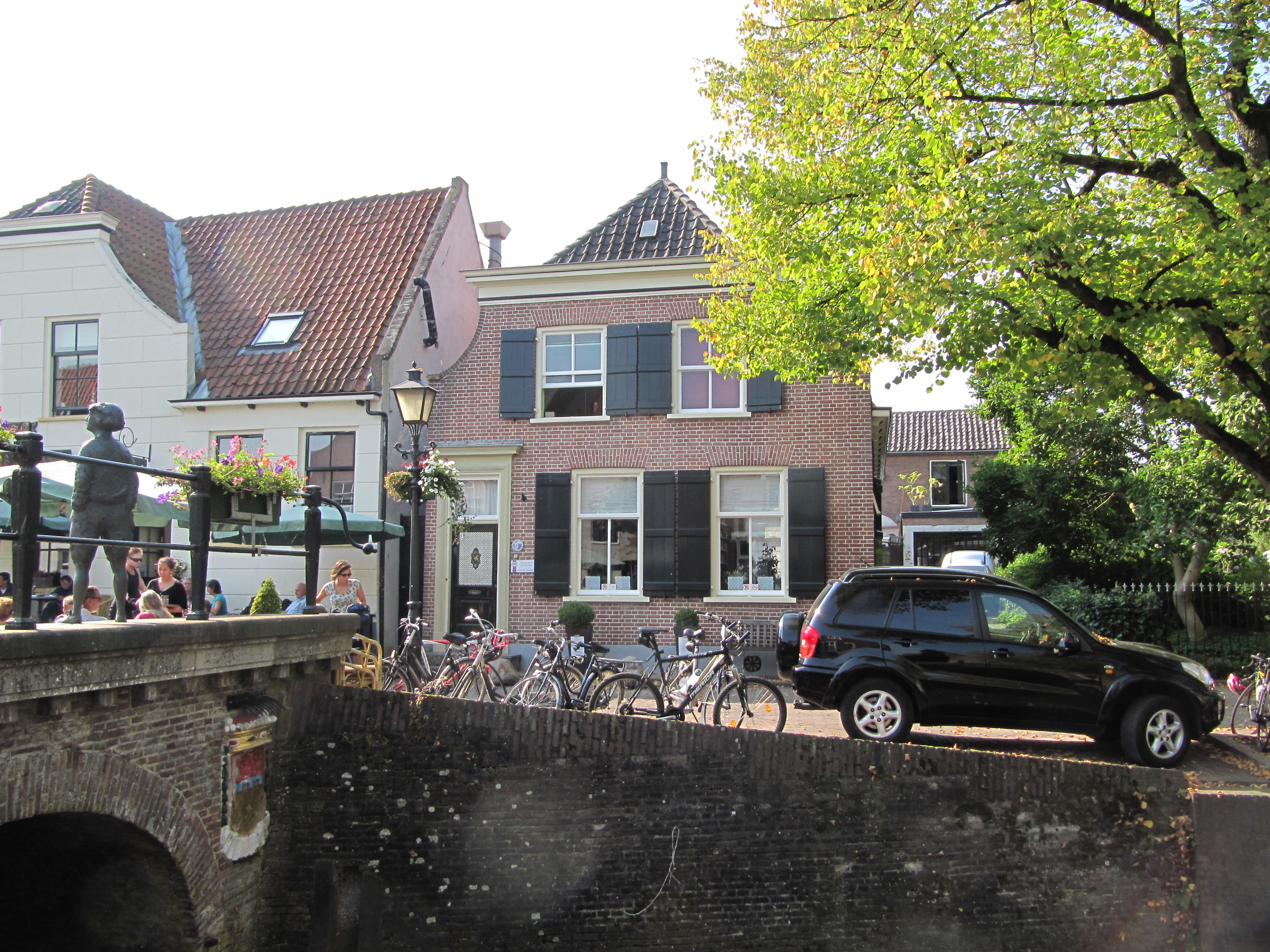 RM30583 Nieuwpoort - Buitenhaven 3.jpg